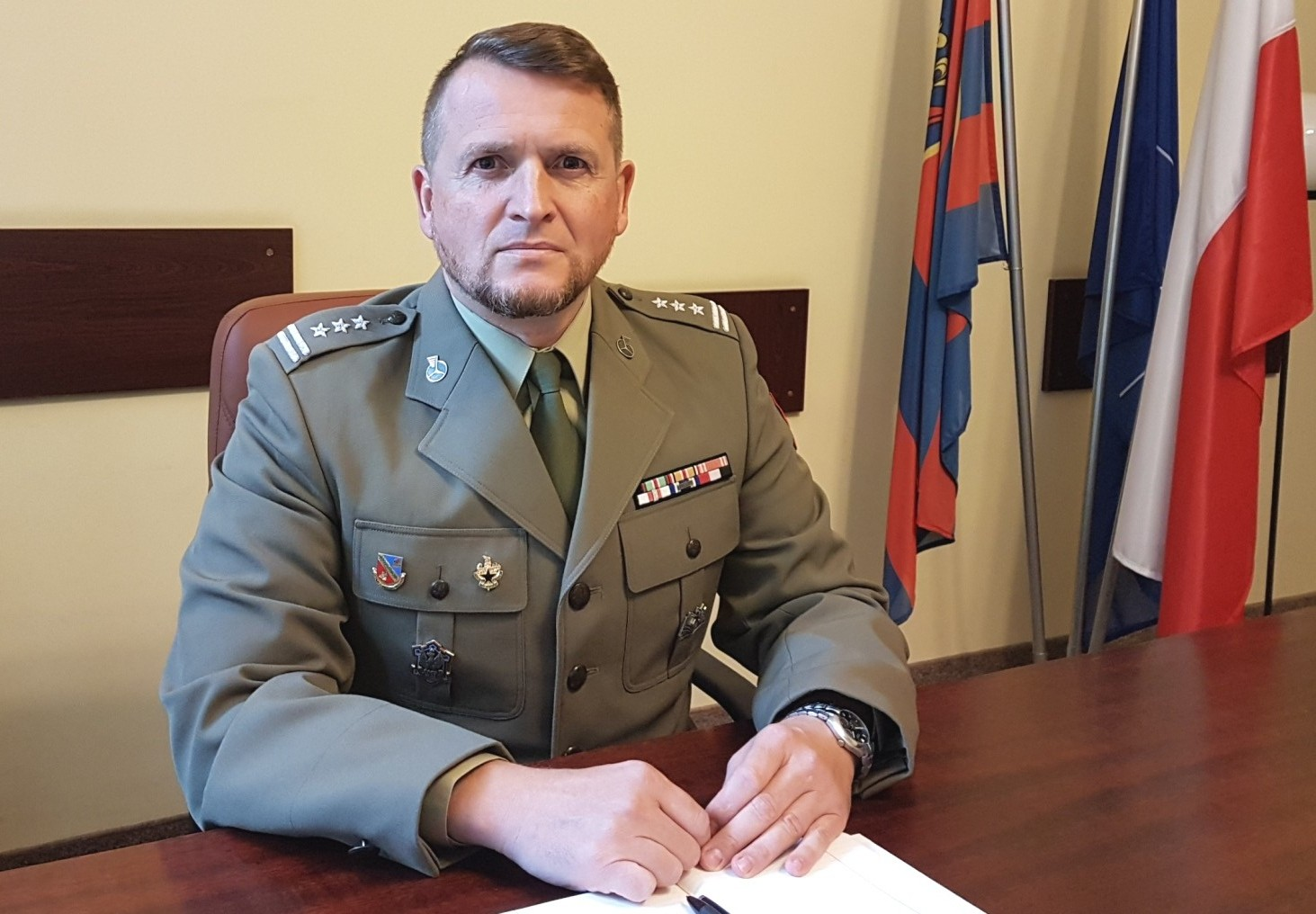 Komendant 109 Szpitala Wojskowego